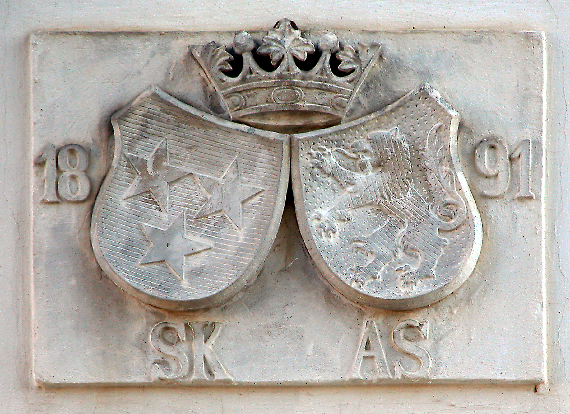 15.10.2007 08539 Leubnitz (Rosenbach), Am Park 1: Schloß, 1794 unter Heinrich Wilhelm von Kospoth im spätbarock-frühklassizistischen Stil errichtet. Supraporte von 1891 über dem hofseitigen Portal mit den Wappen des sächsischen Generalleutnants Sylvio von Kospoth und seiner Ehefrau Angela von Schönberg. [DSCN30686.TIF]20071015715DR.JPG(c)Blobelt